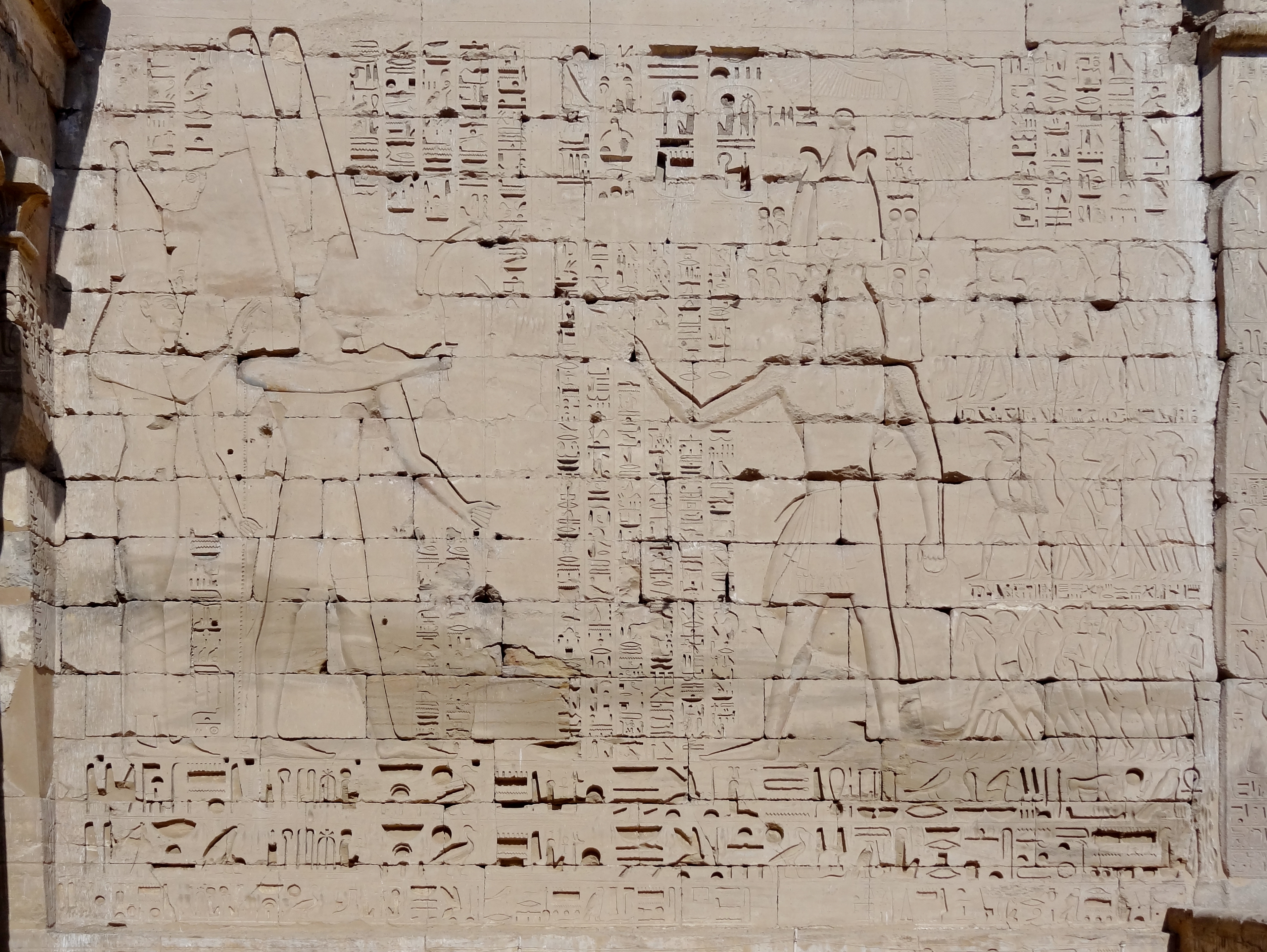 Relief im ersten Innenhof am zweiten Pylon des Totentempels Ramses’ III. in Medinet Habu, Ägypten